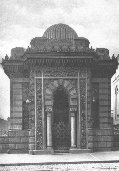 Караимская кенасса в Киеве